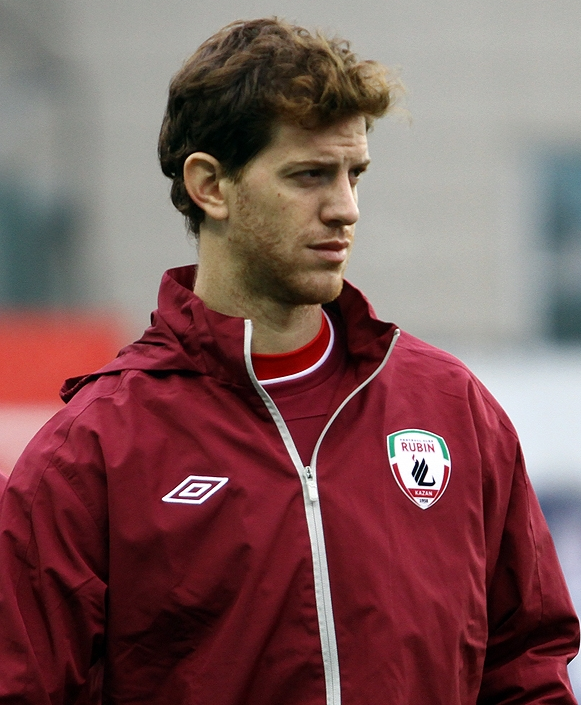 Кристиан Ансальди